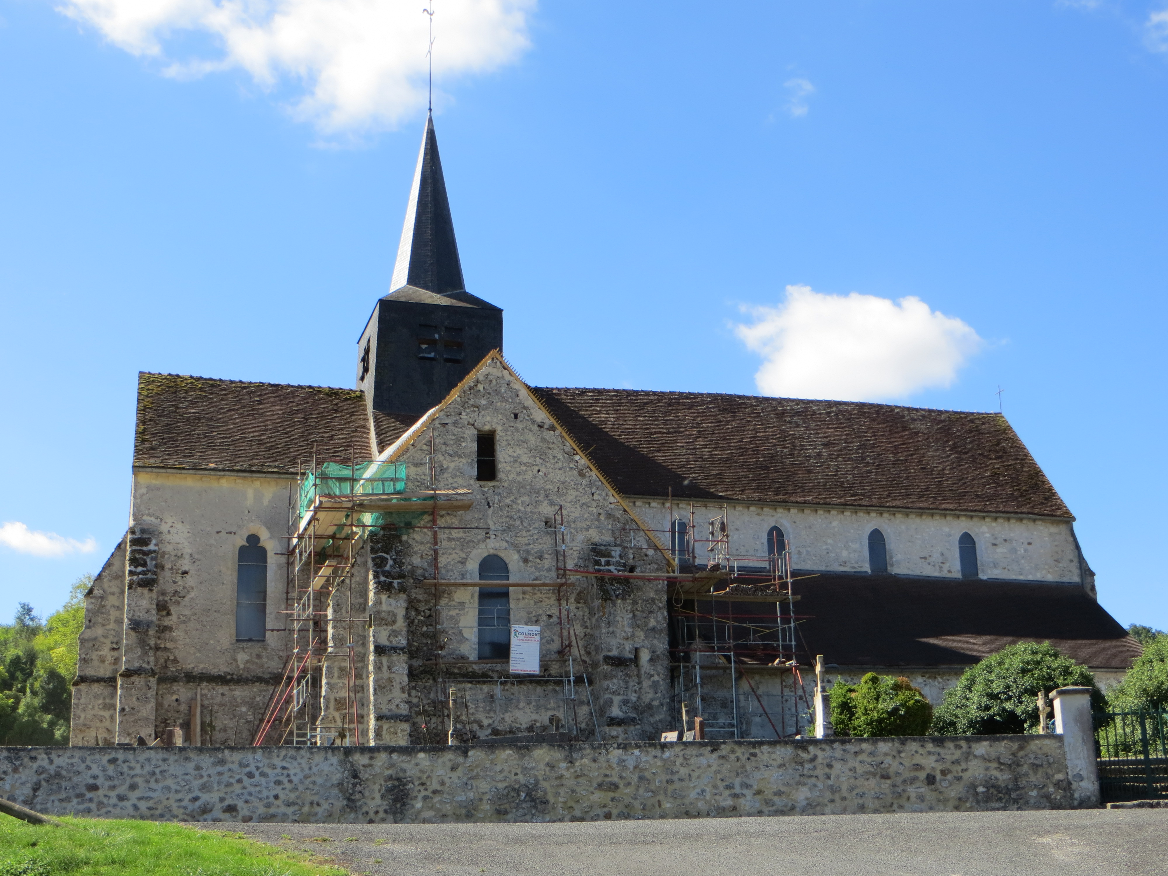 Vue générale de l'église